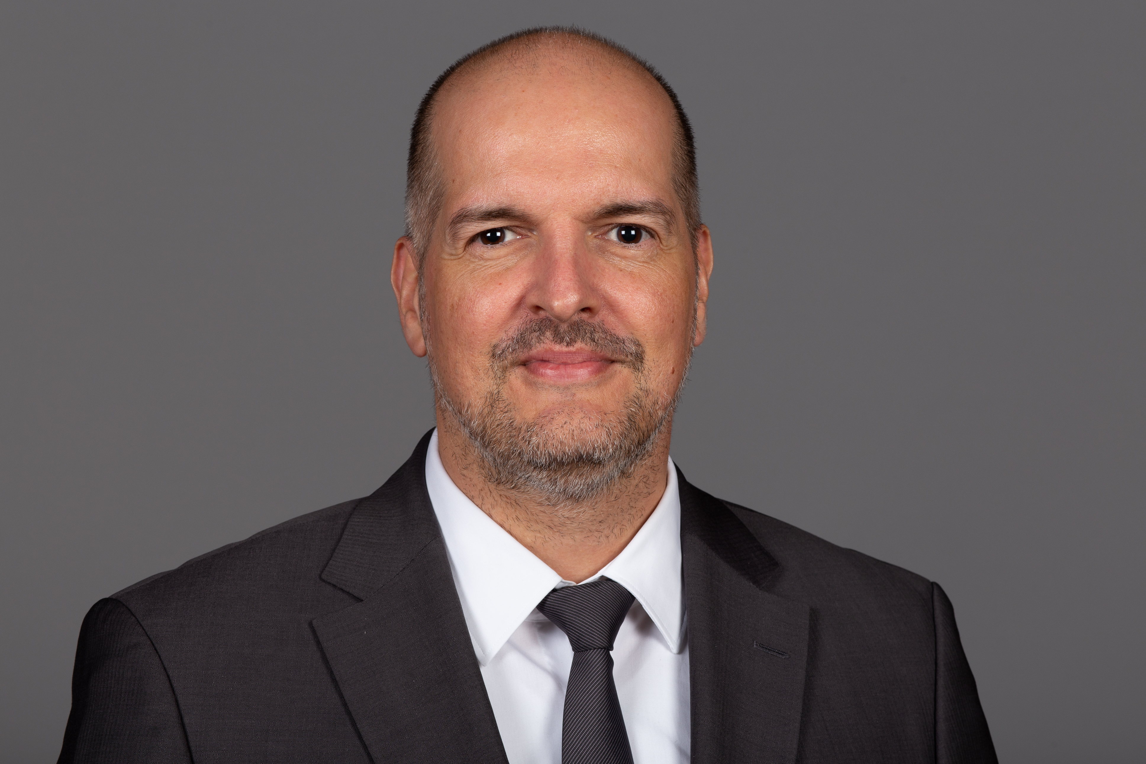 Abgeordnete(r) der Bürgerschaft der Freien und Hansestadt Hamburg Milan Pein